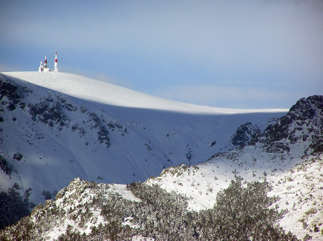 Vista de la Bola del Mundo desde la Barranca.